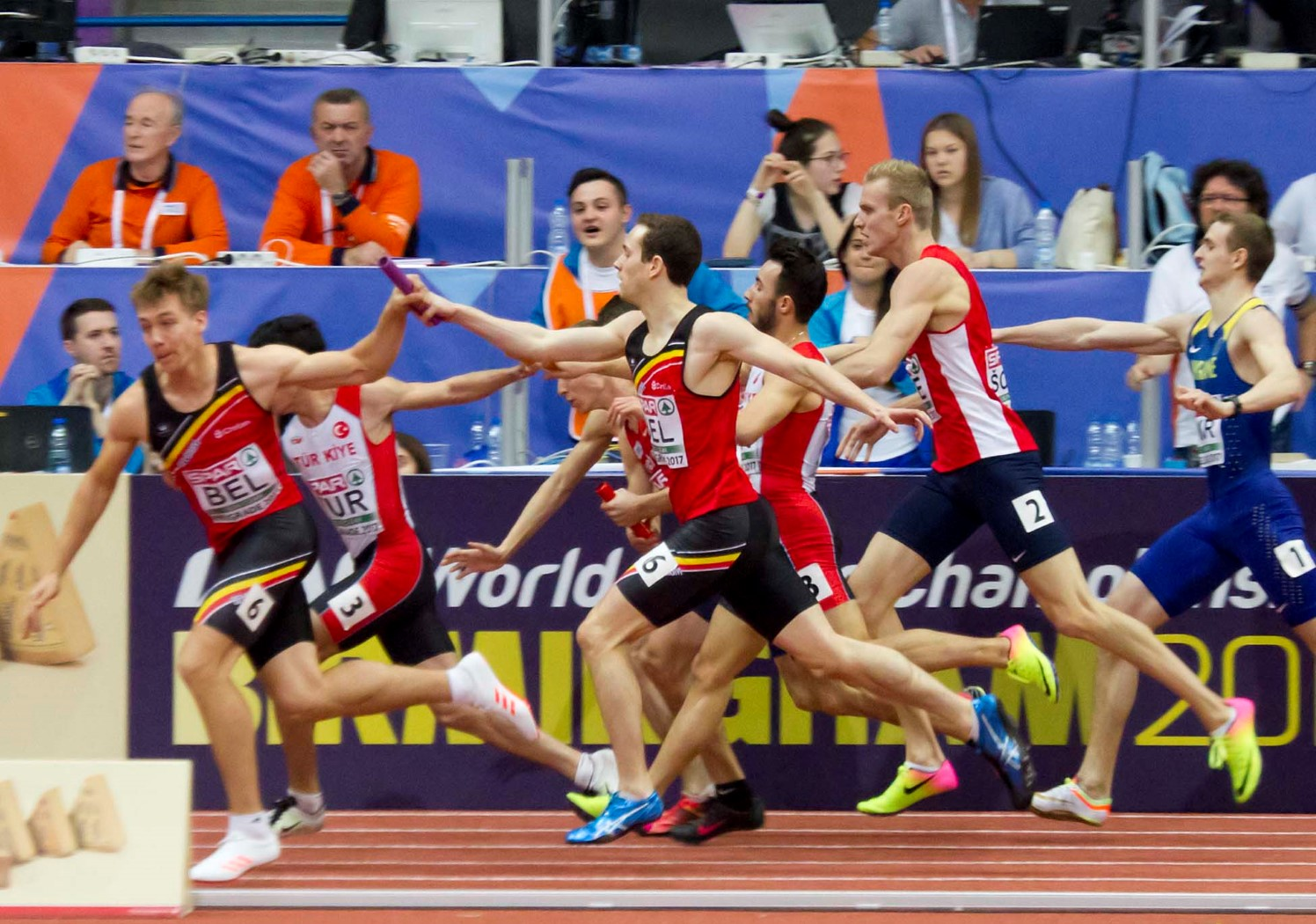 580 4x400 vanderbemden watrin